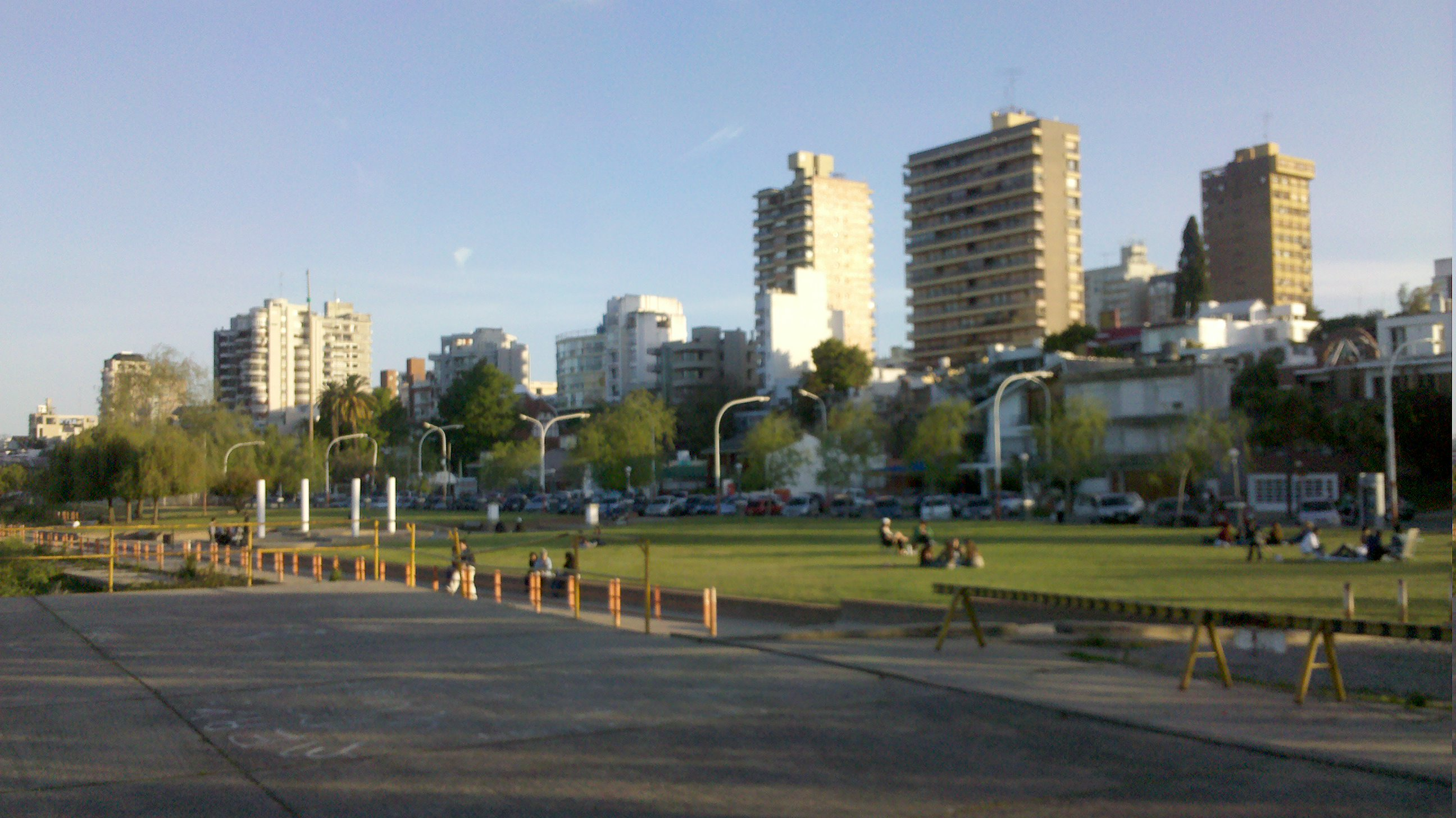 Foto tomada desde la costanera vieja.